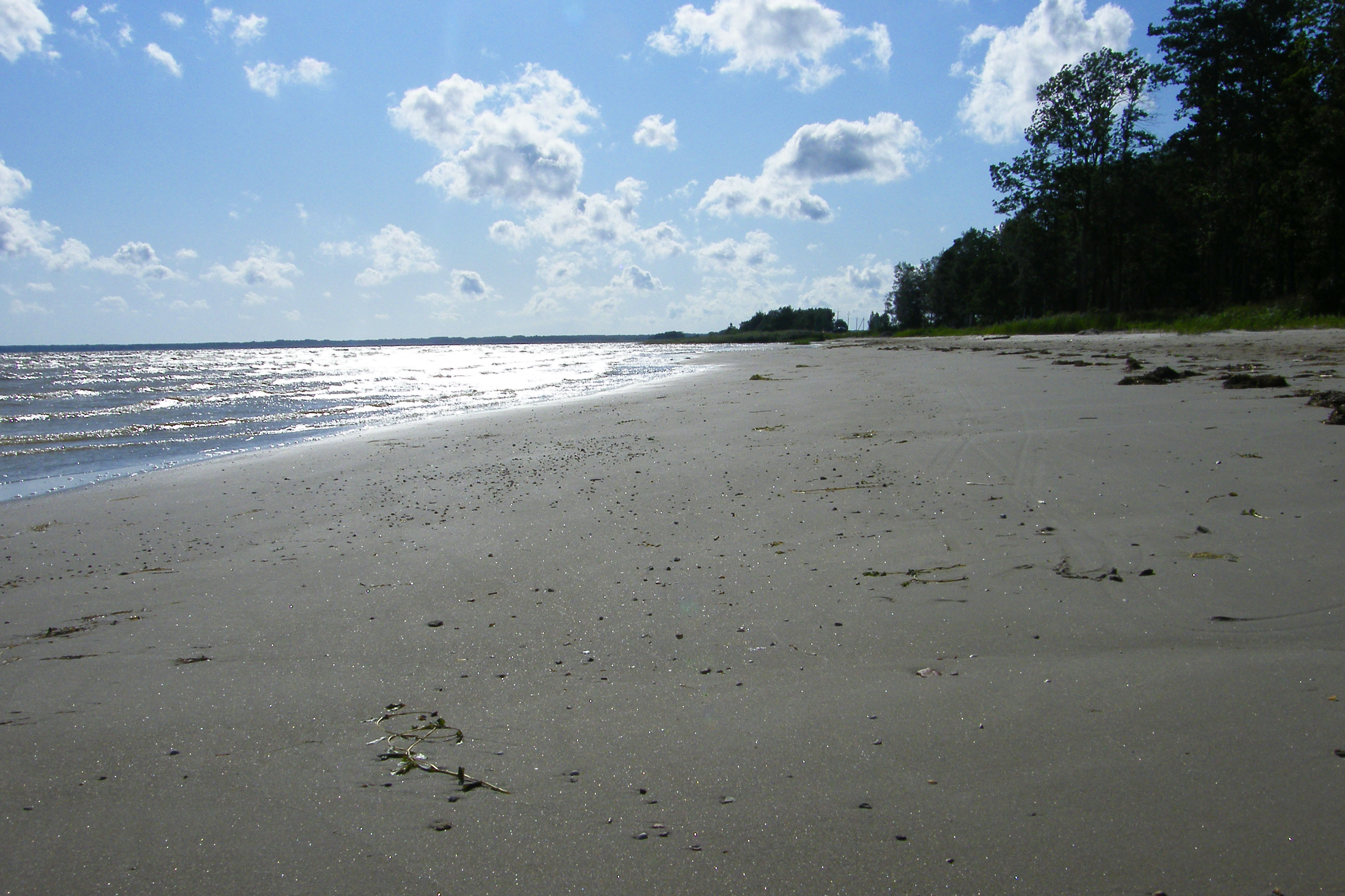 Valgeranna beach in Estonia.